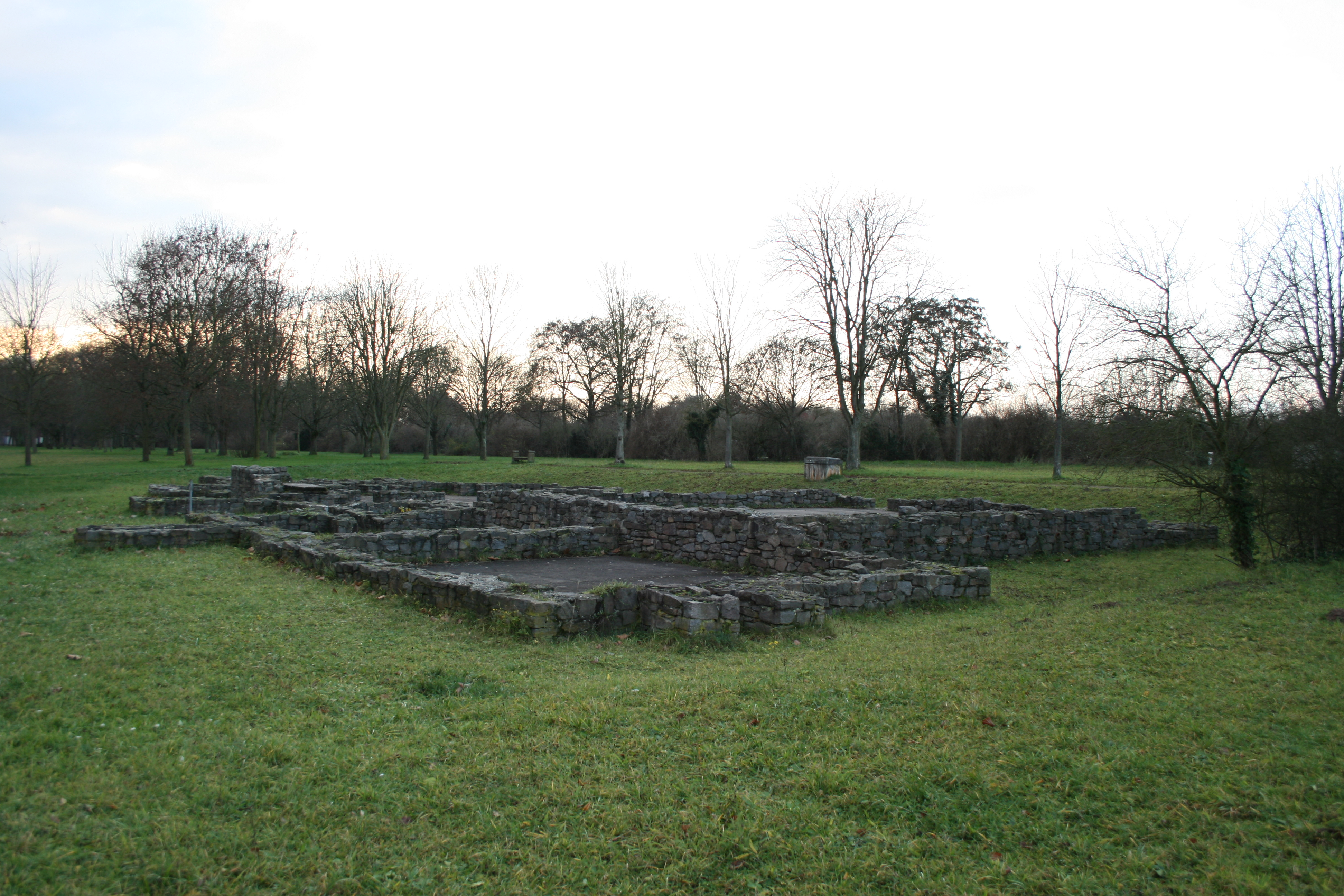 Das in den Nilkheimer Park versetzte, restaurierte Kastellbad des Kastell Stockstadt.